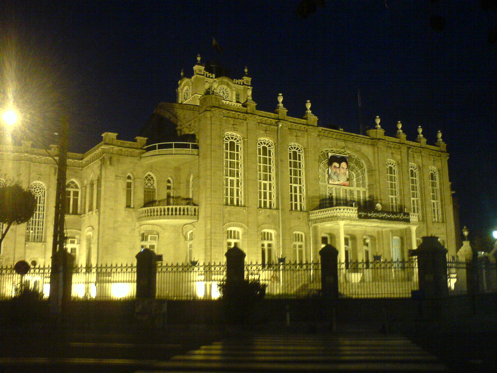 Saat tower at night.